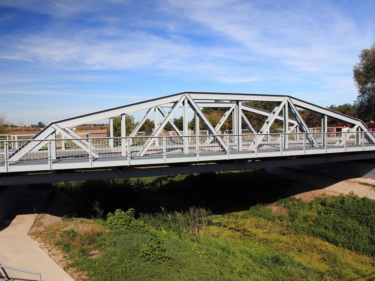 Maurzyce